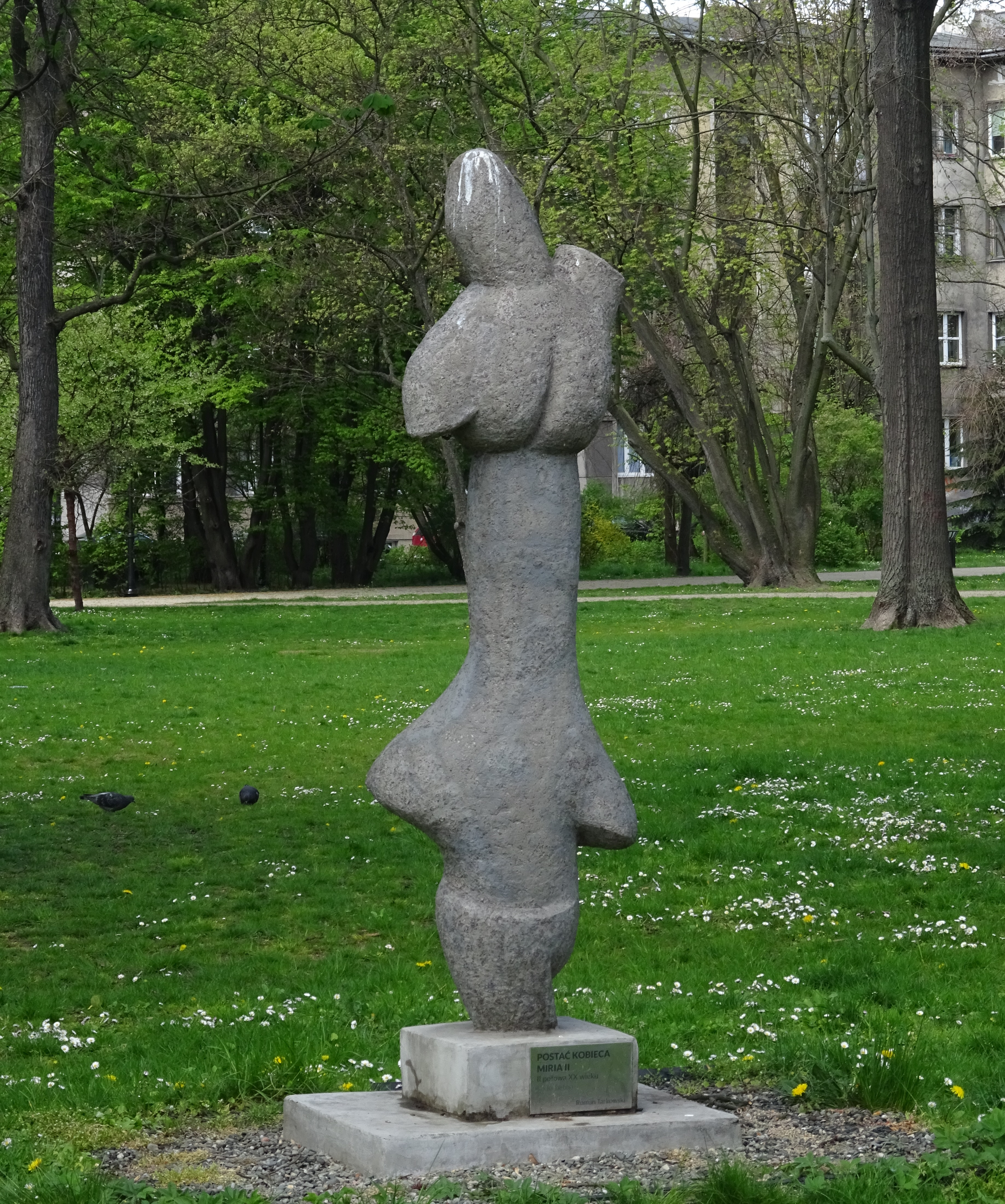 Rzeźba „Postać kobieca, Miria II”, autorstwa Romana Tarkowskiego z II połowy XX wieku, znajdująca się w Parku Krakowskim w Krakowie.